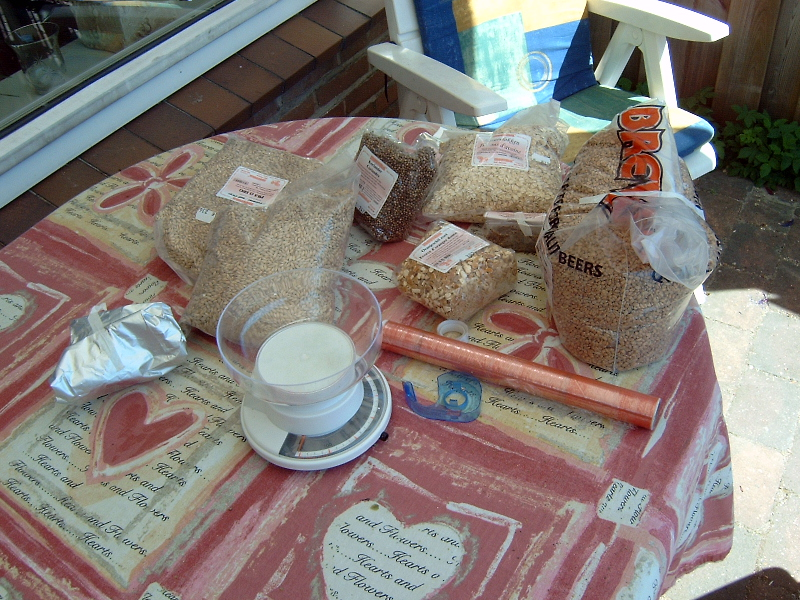 Grondstoffen voor de thuisbrouwer.